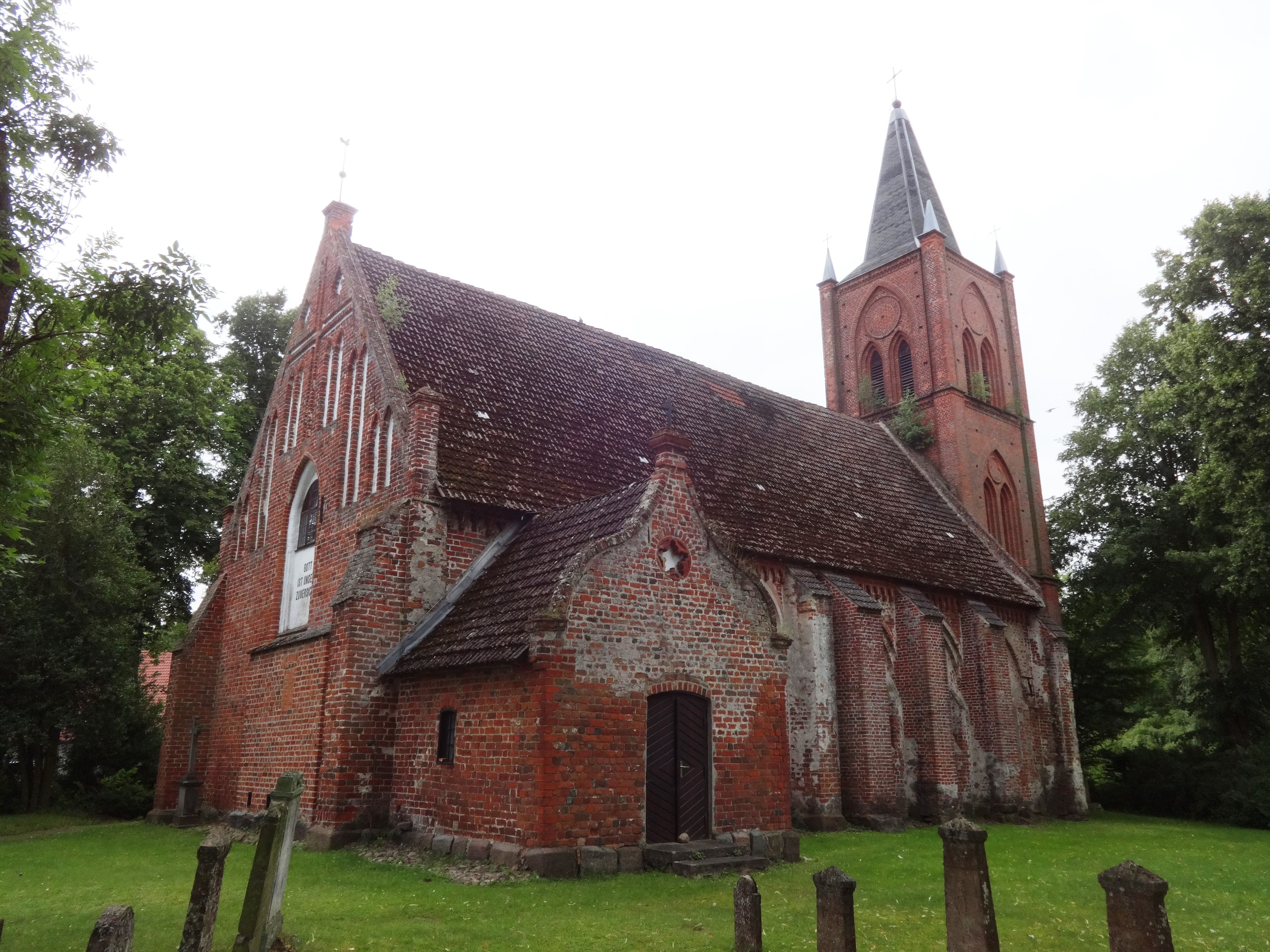 Heilig-Kreuz-Kirche, gotische Hallenkirche bei Greifswald, Landkreis Vorpommern-Greifswald in Mecklenburg-Vorpommern